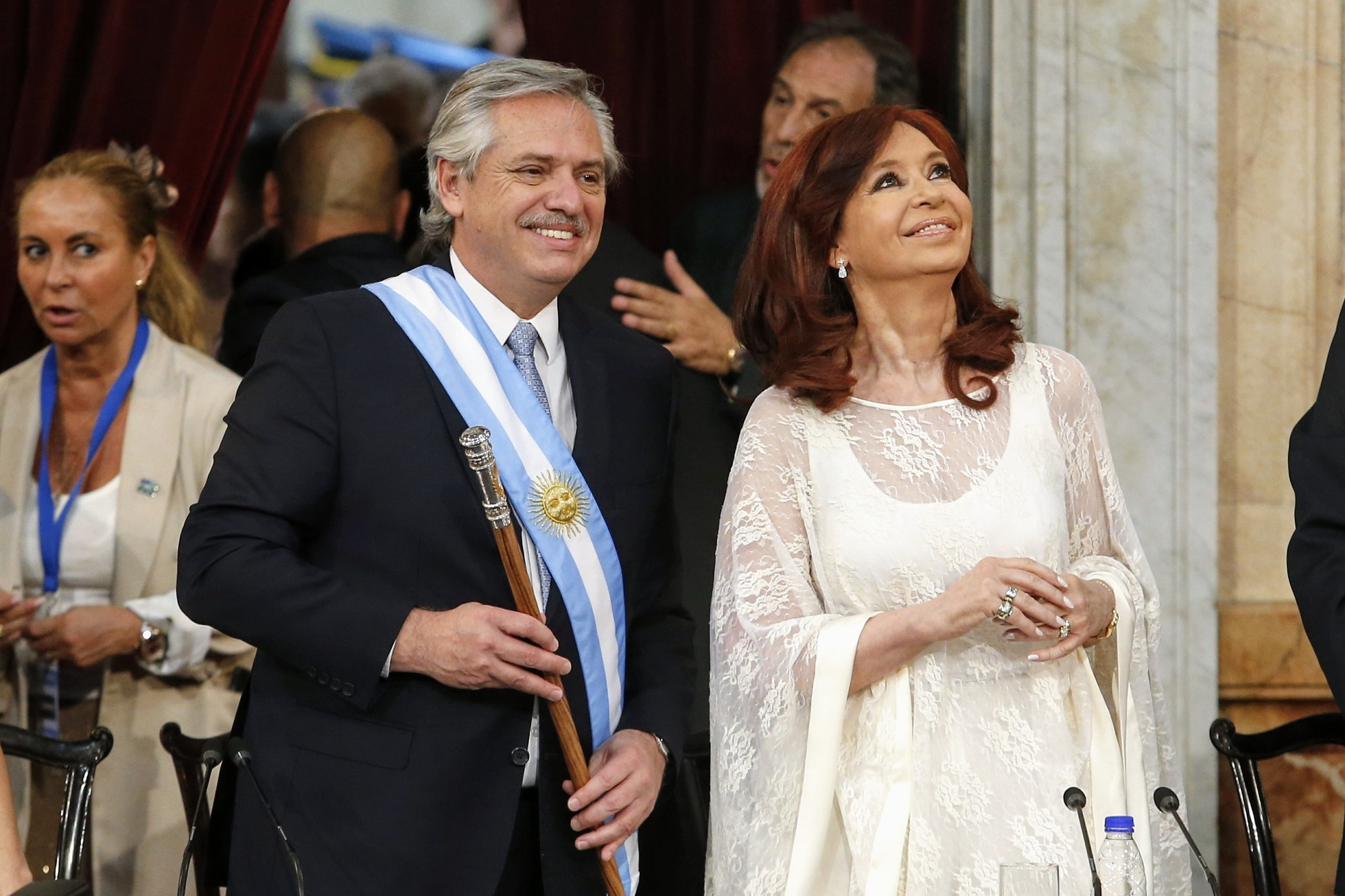 Alberto Fernández y Cristina Fernández de Kirchner, tras asumir como presidente y vicepresidenta de la Nación Argentina.